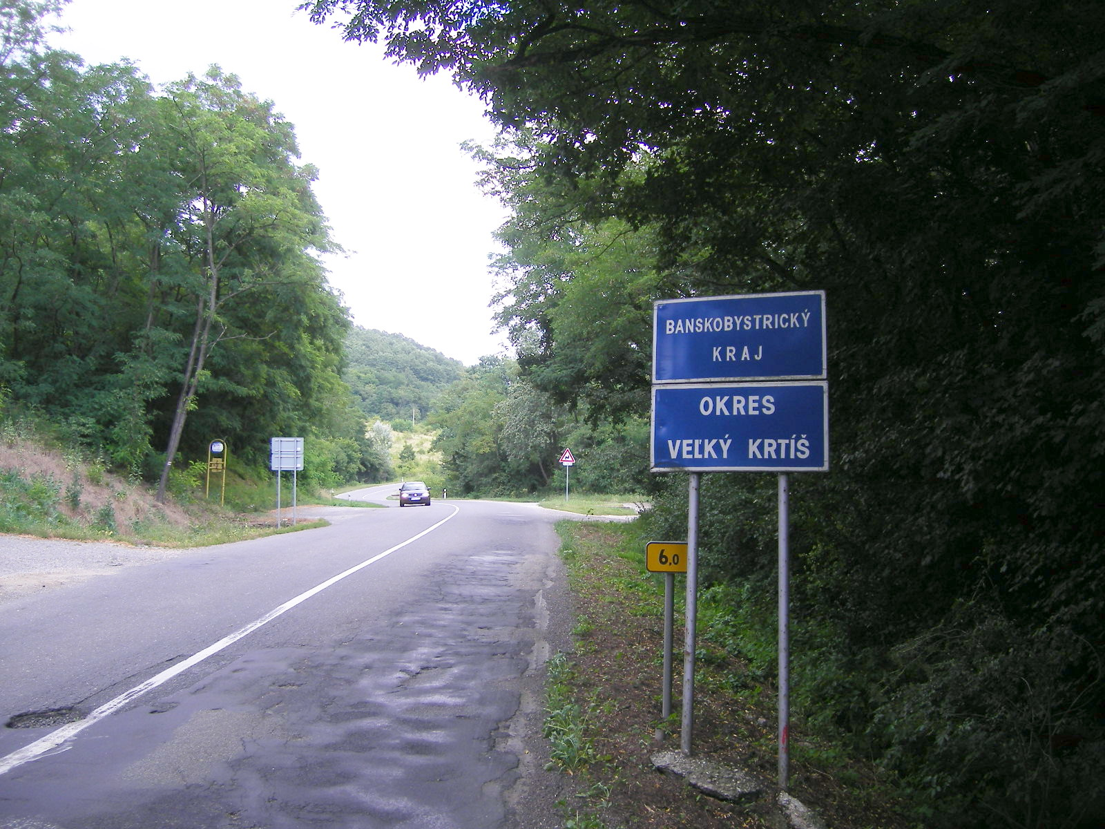 Ipolyhídvég - Ipolyhídvég és Ipolyság határán (527-es út)